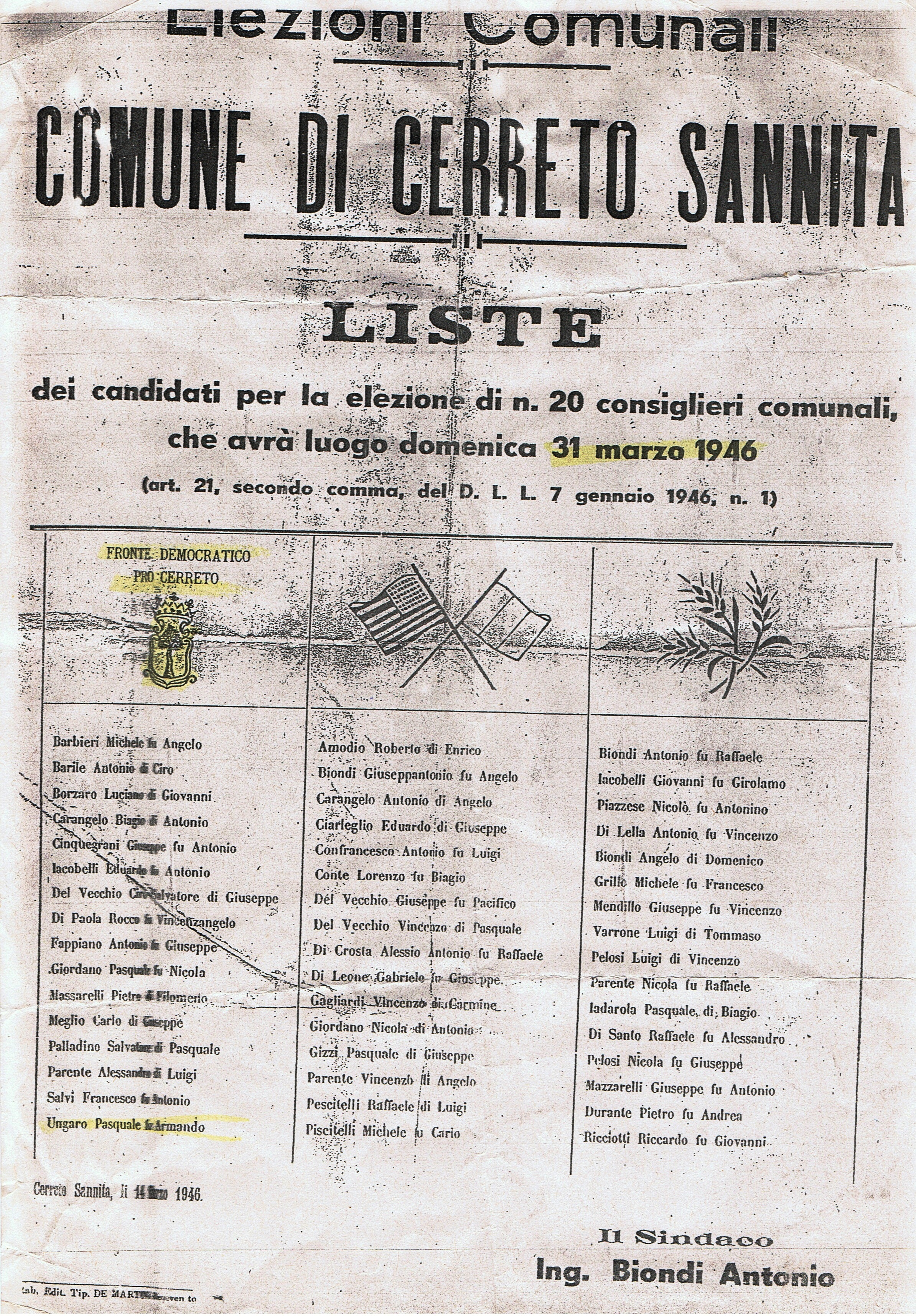 Manifesto delle elezioni del Consiglio comunale di Cerreto Sannita del 31 marzo 1946.